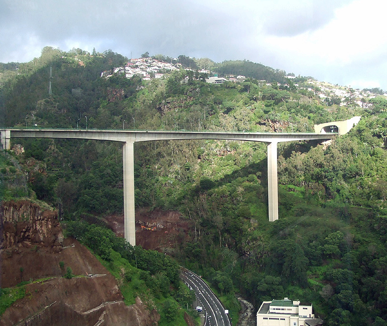 Madeirský most, Funchal